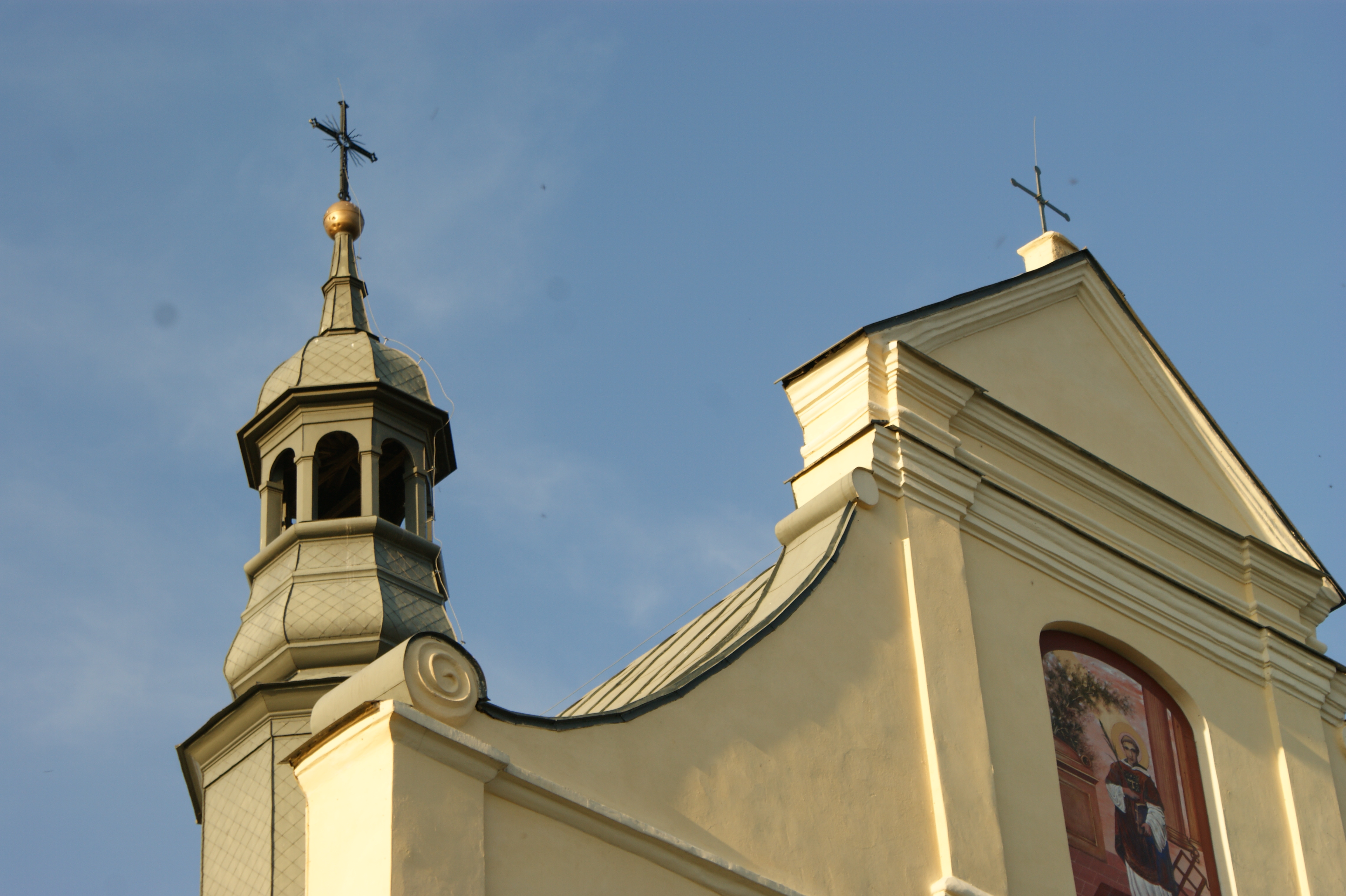 Kościół św. Wawrzyńca w Żółkiewce, woj. lubelskie